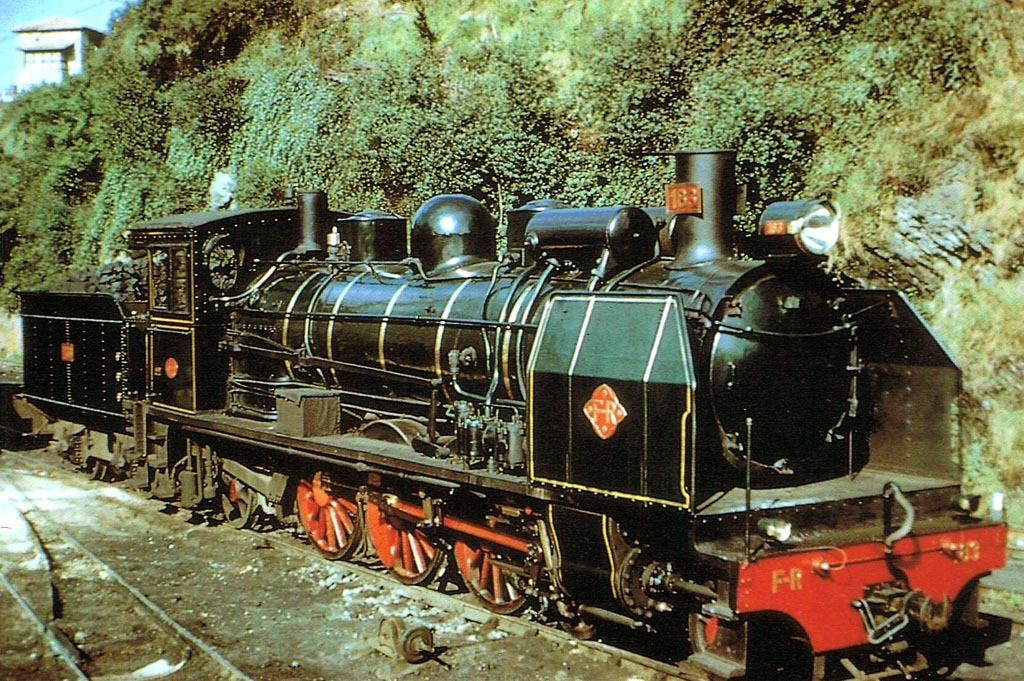 Tren makina tuneztarra Balmasedako geltokian. 60. hamarkada.